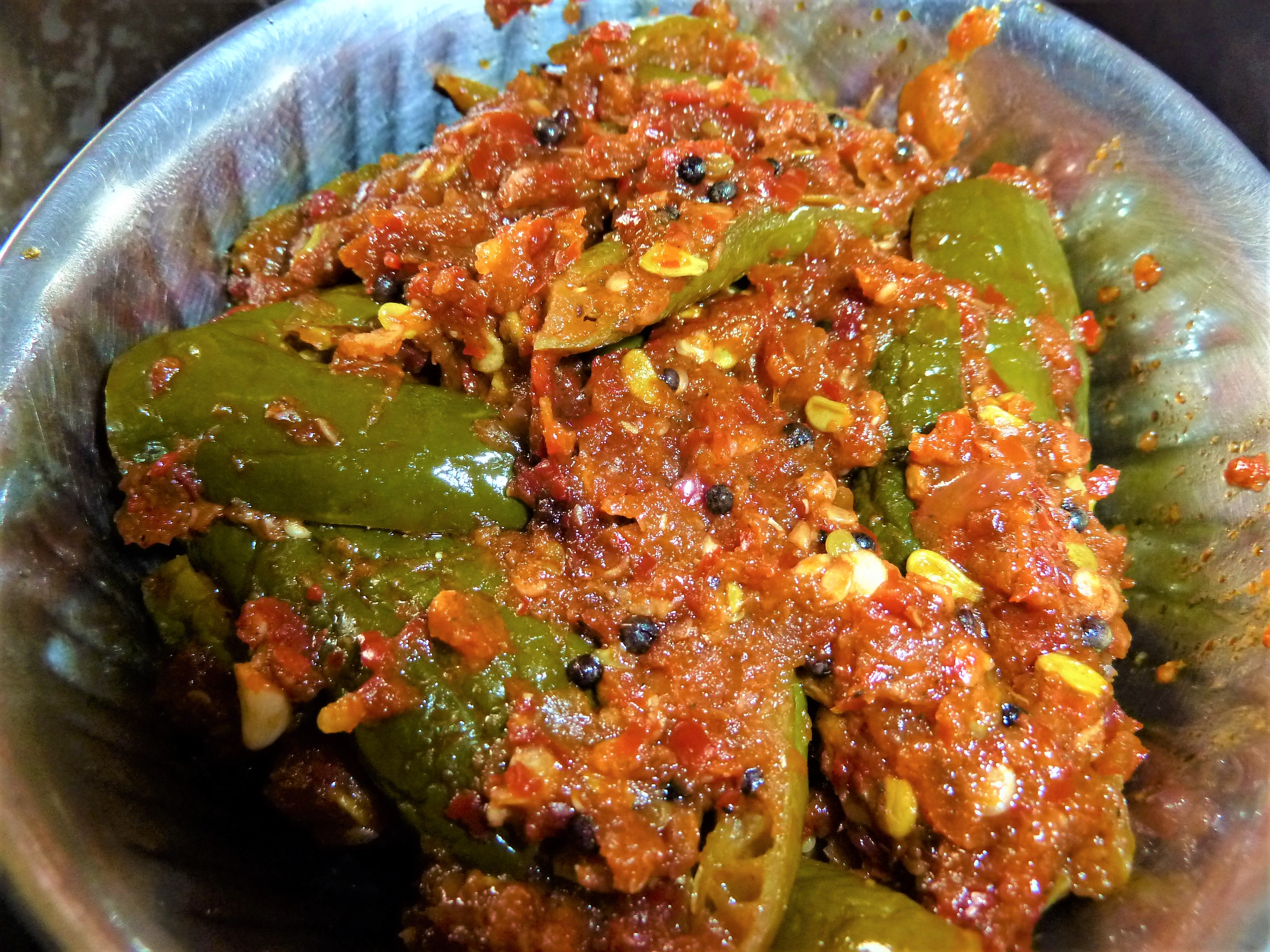 దొండకాయ ఉల్లిపాయ కారం కూర